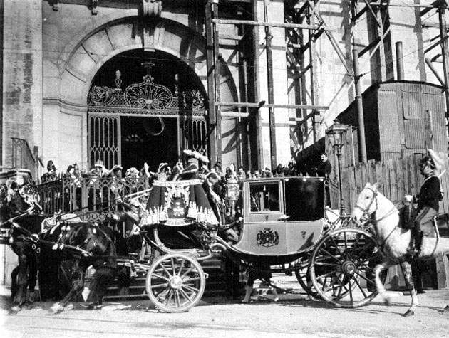 Dom Manuel II na Sé de Lisboa depois da abertura das Cortes (Ref: A8481)